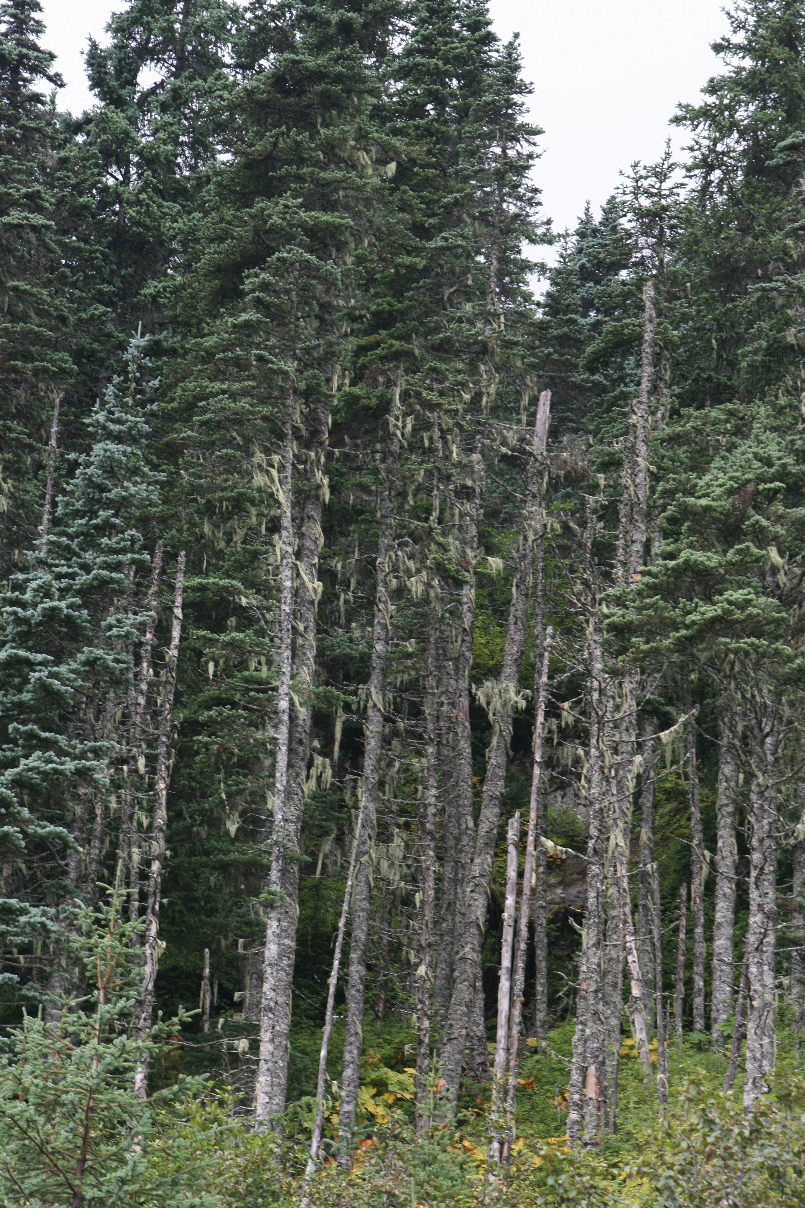 Picea × lutzii forest, near Skagway, Alaska